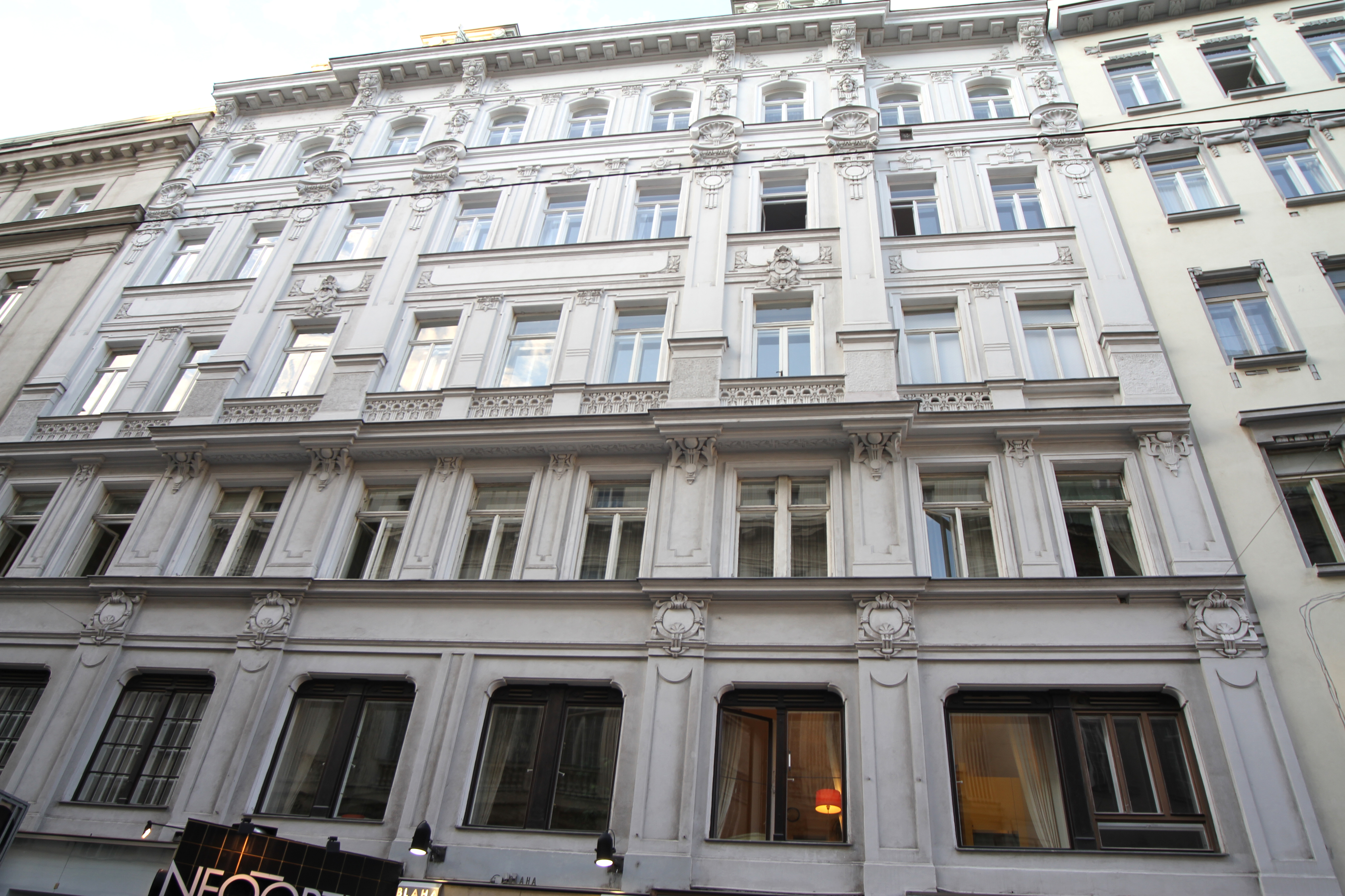 Dreiheiligenhof